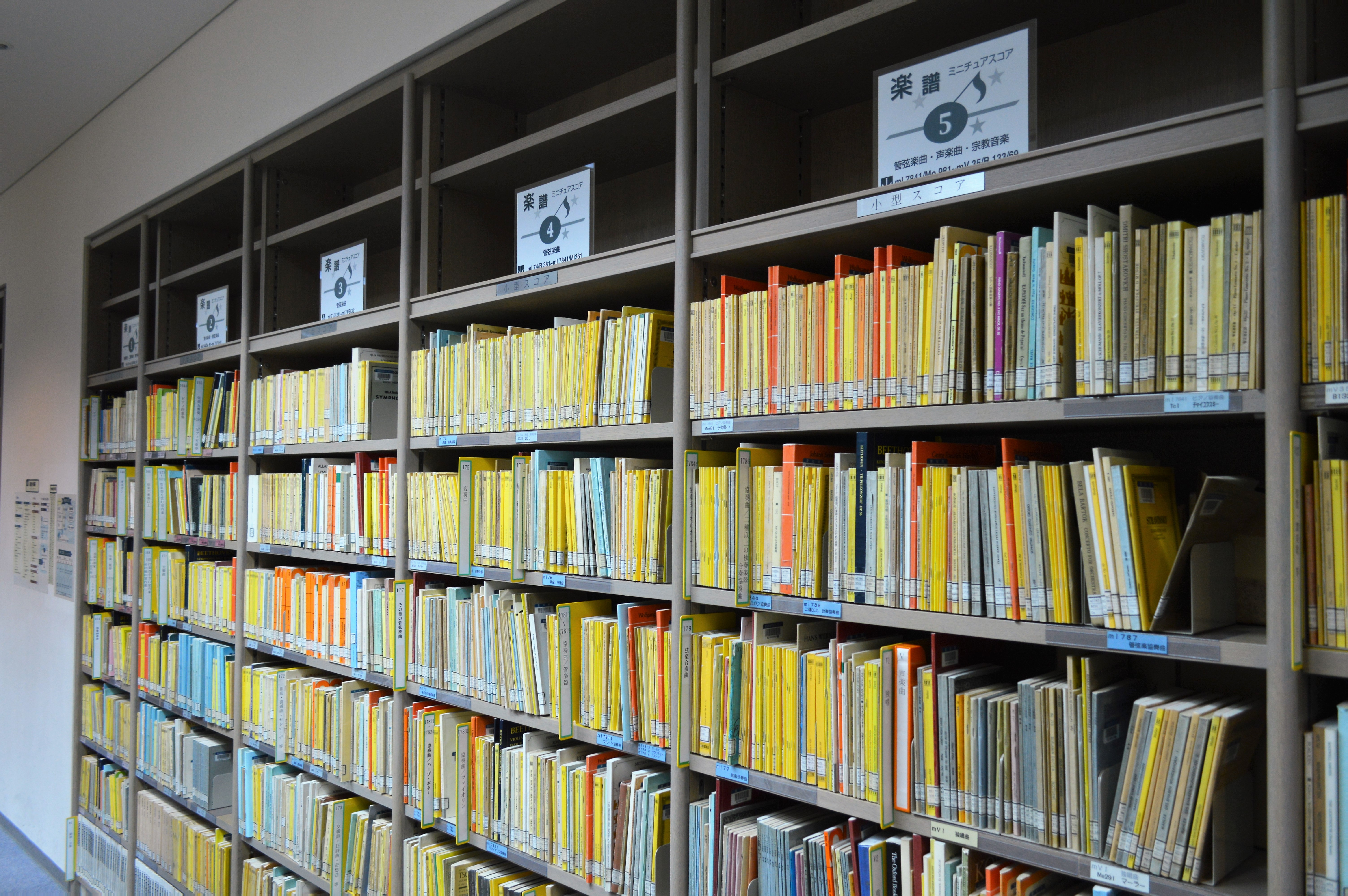 愛知県名古屋市東区東桜（栄）にある愛知芸術文化センターアートライブラリー。楽譜の書架。